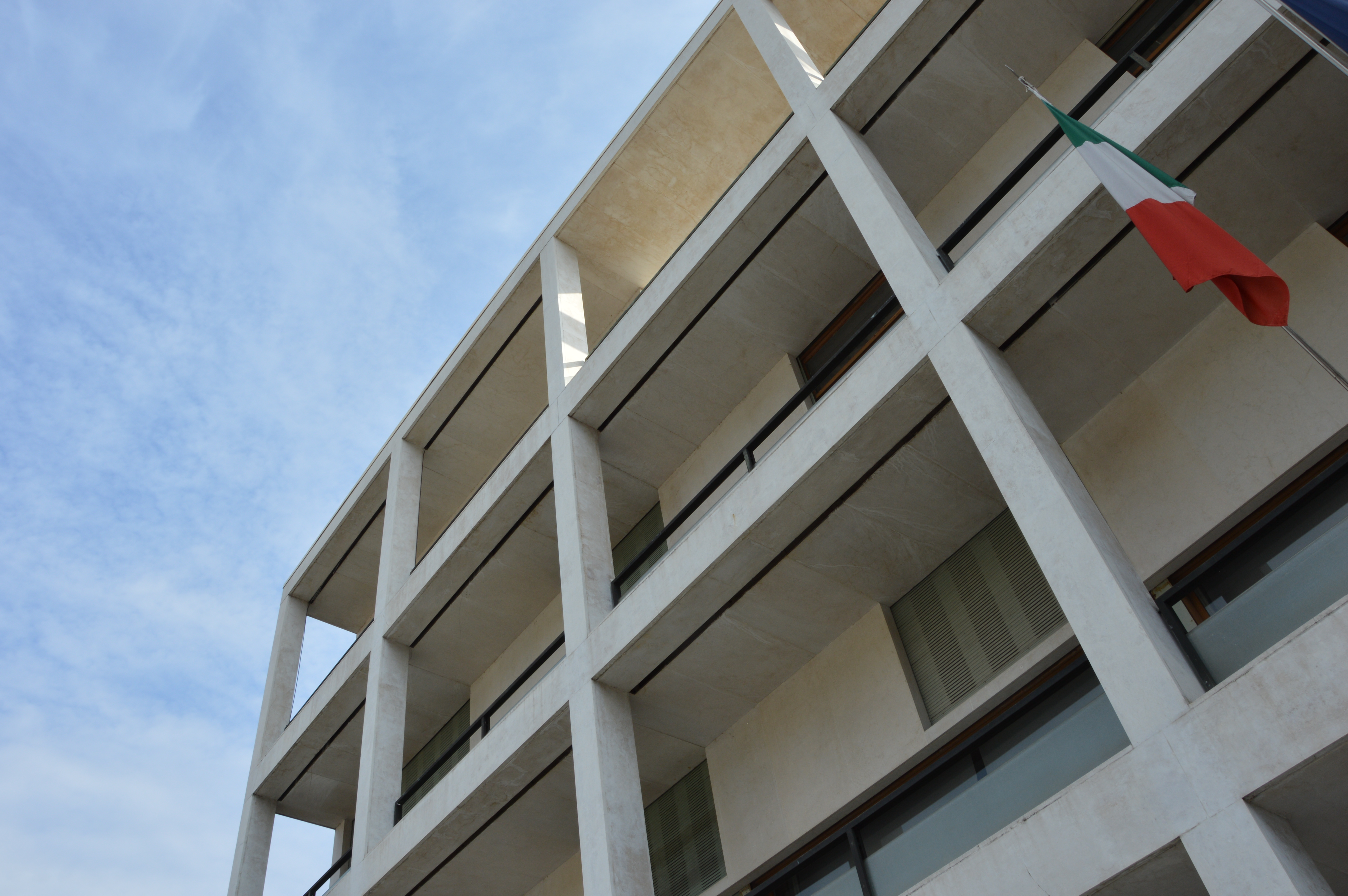 Casa del Fascio This is a photo of a monument which is part of cultural heritage of Italy.